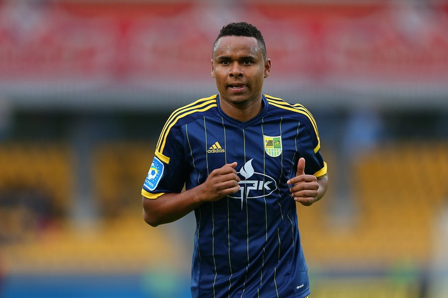 Жажа під час виступів за ФК Металіст